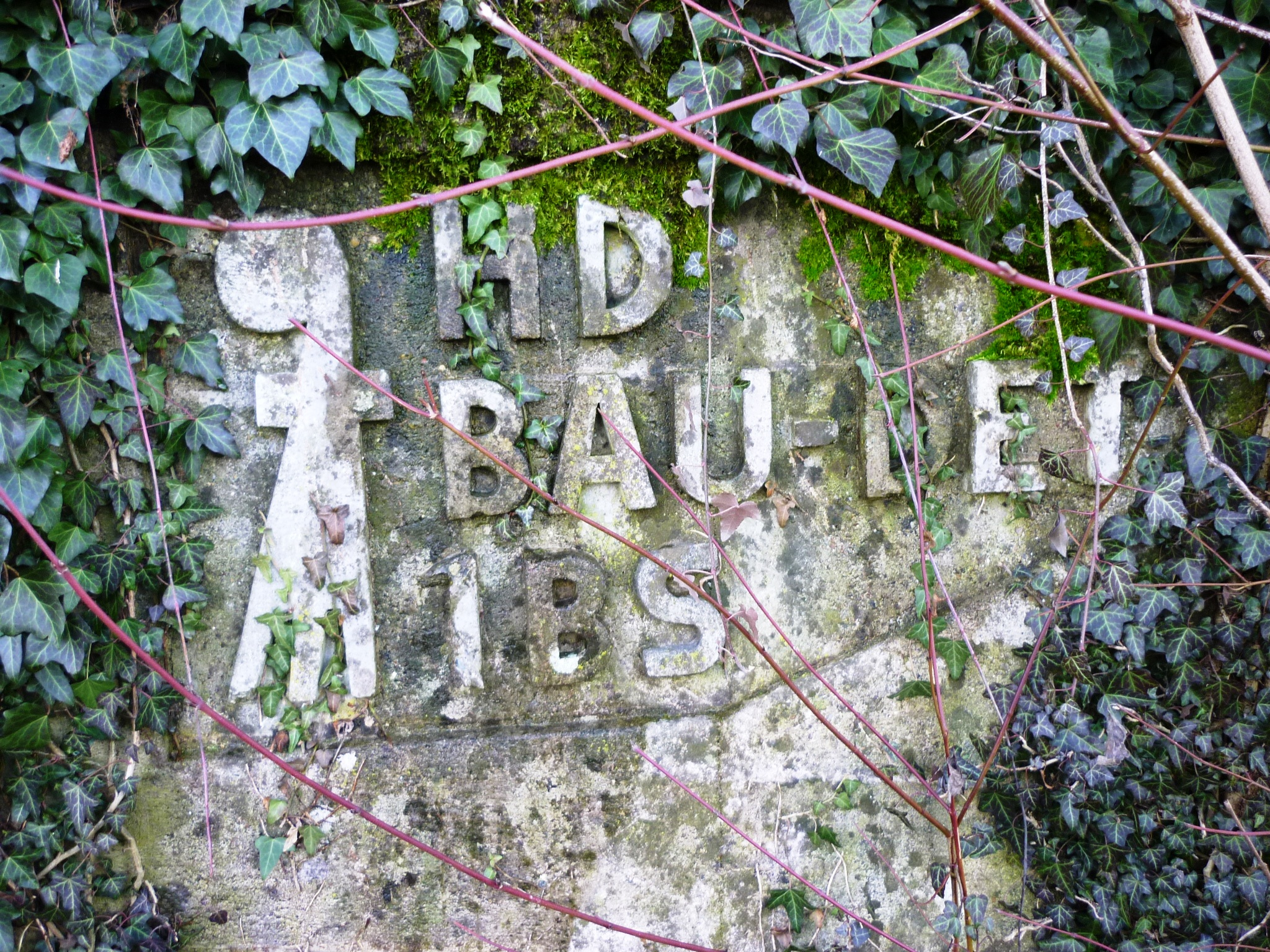 Tankmauer Lindenbüel, Dietikon ZH, Schweiz